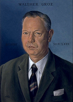 Foto eines Porträts von Walther Groz, gemalt von Werner Schramm, 1969